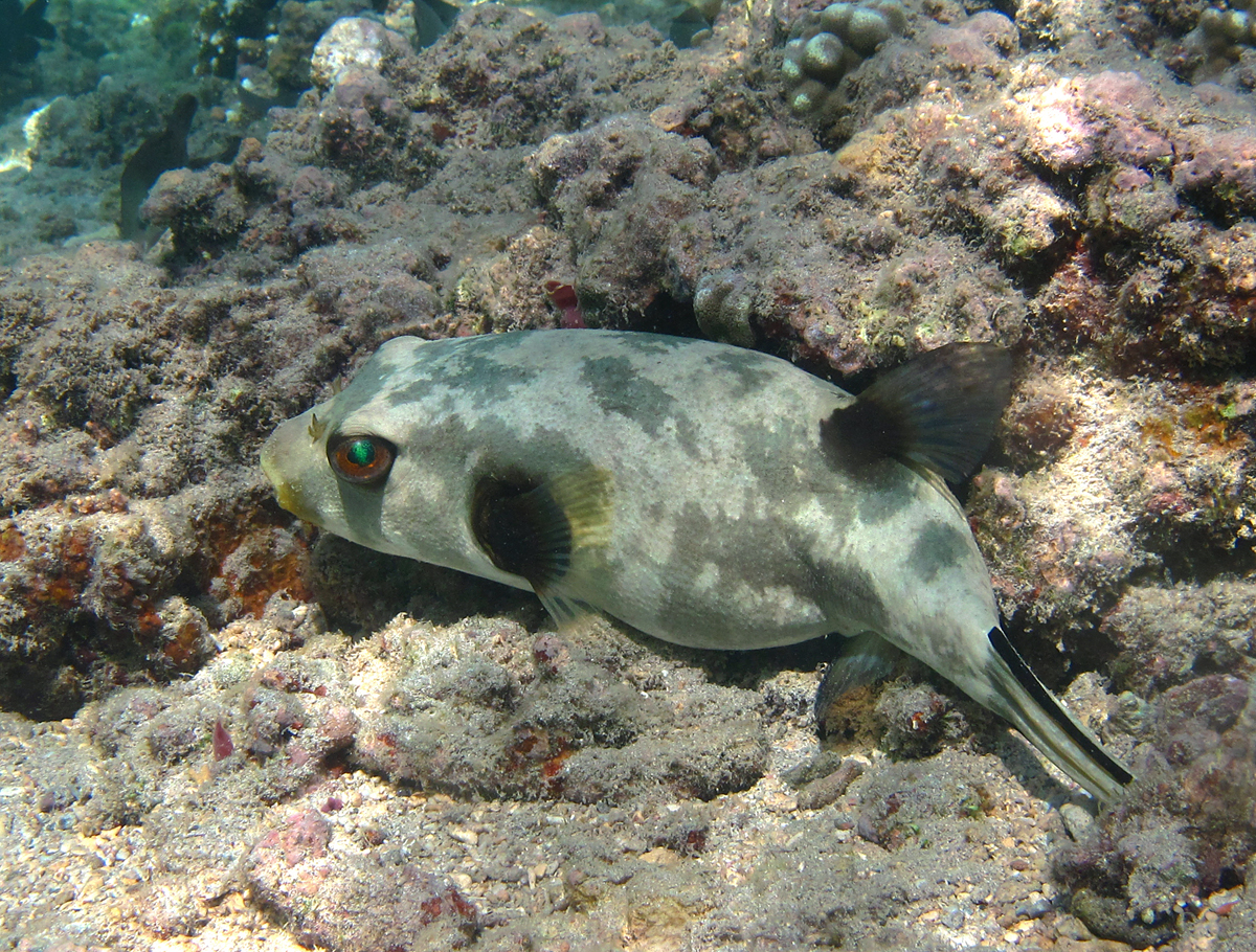 Un poisson-ballon à lignes brunes (Arothron hispidus) , en livrée de camouflage (son corps est ordinairement blanc), à la Réunion.